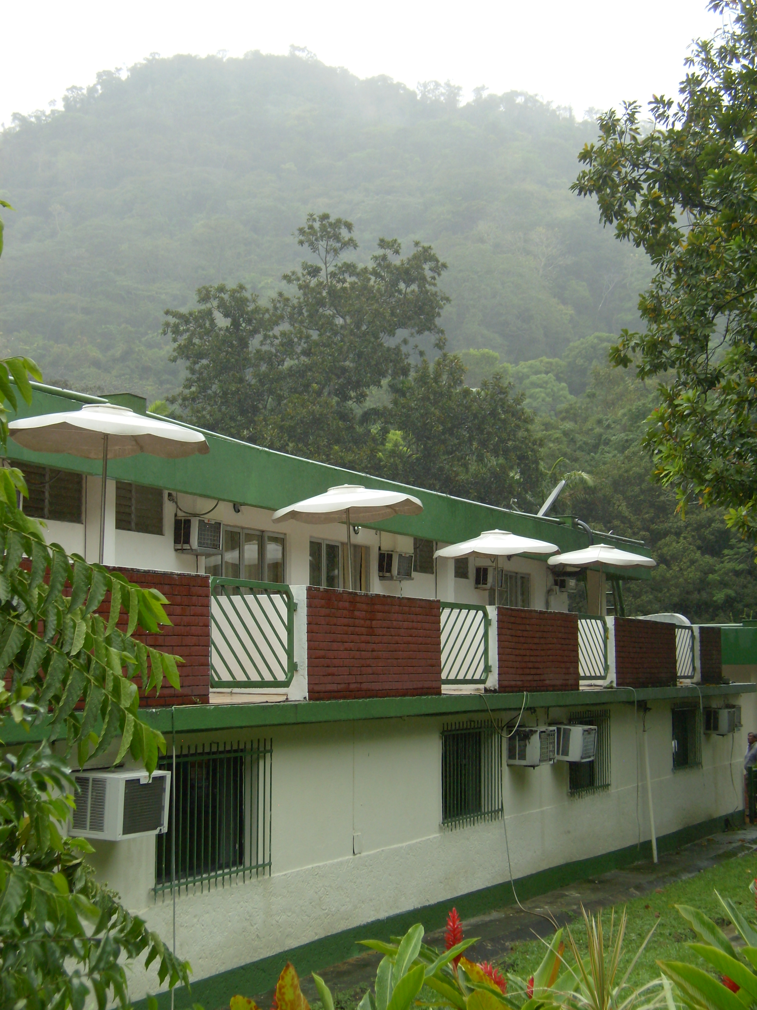 Trinchera Edo. Carabobo